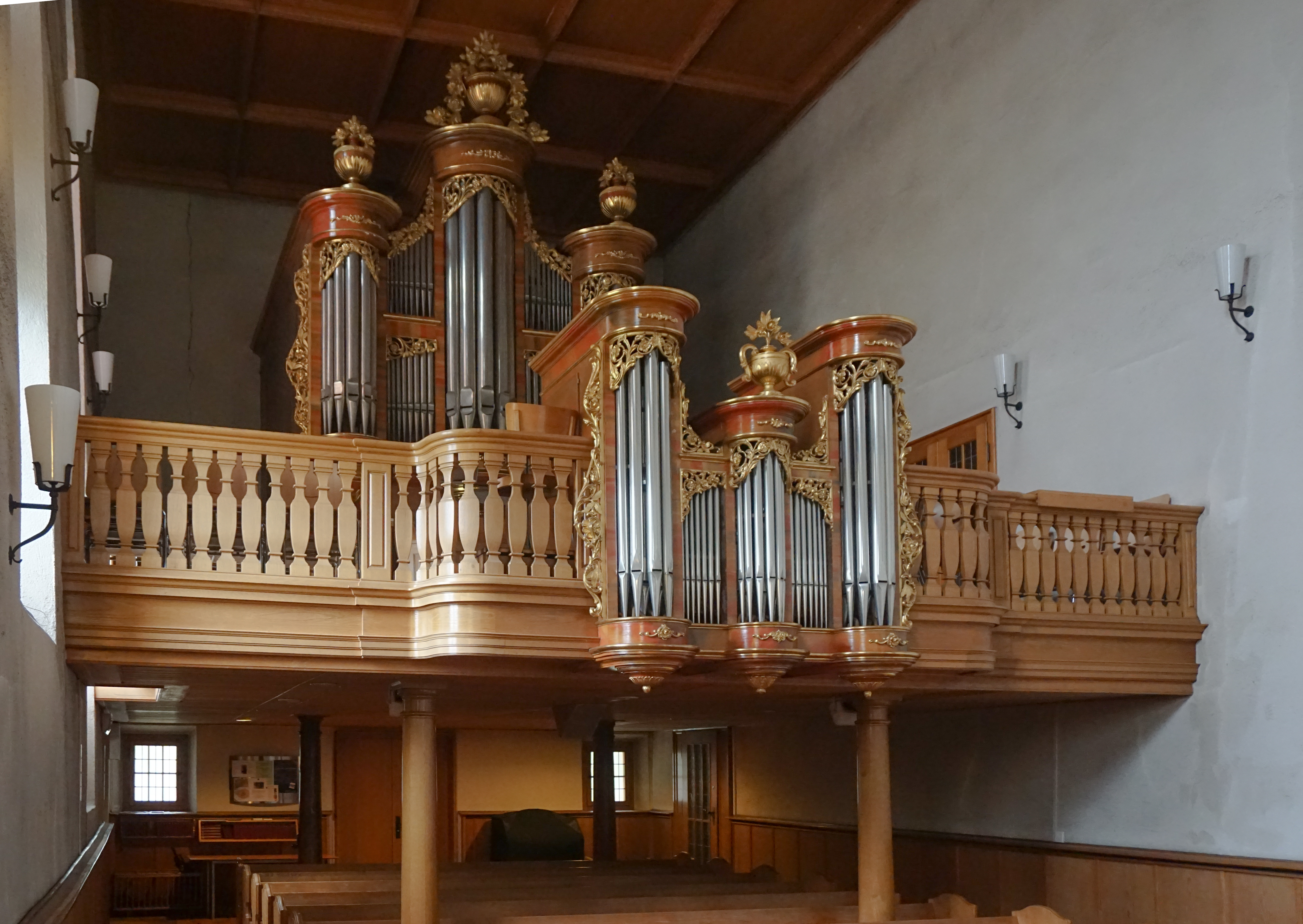 Kirche Münchenbuchsee Orgelempore